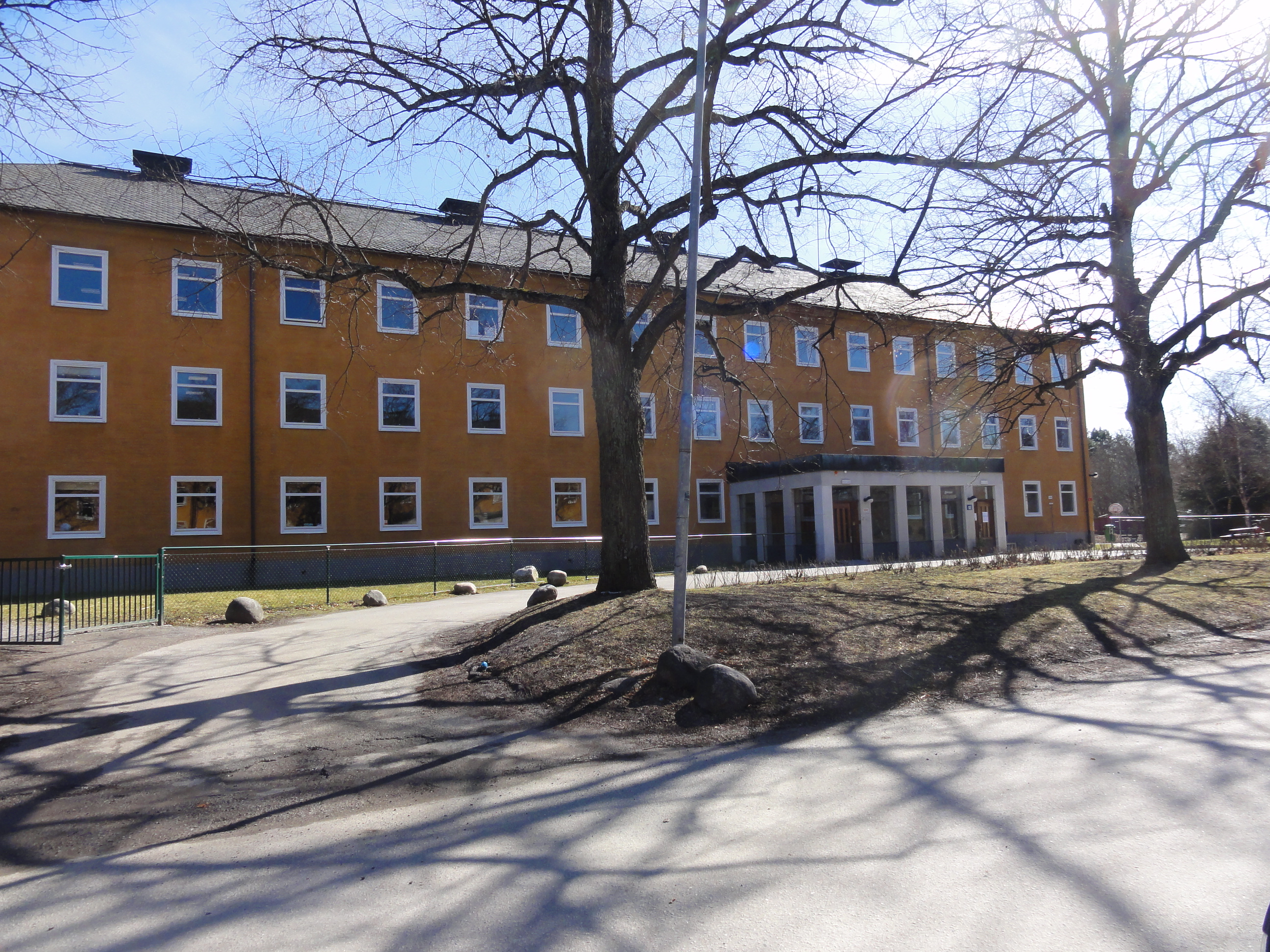 Raoul Wallenbergskolan, Bromma, Stockholm. Byggnaden tidigare en del av Beckomberga sjukhus.